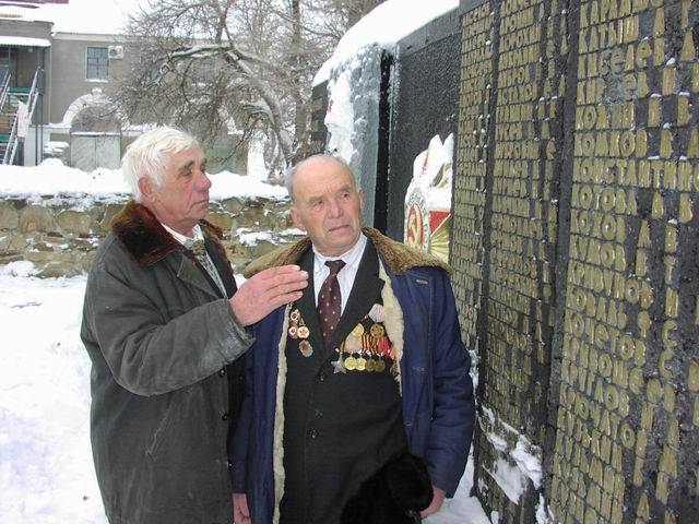 Ветераны